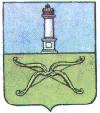 Герб Курмыша